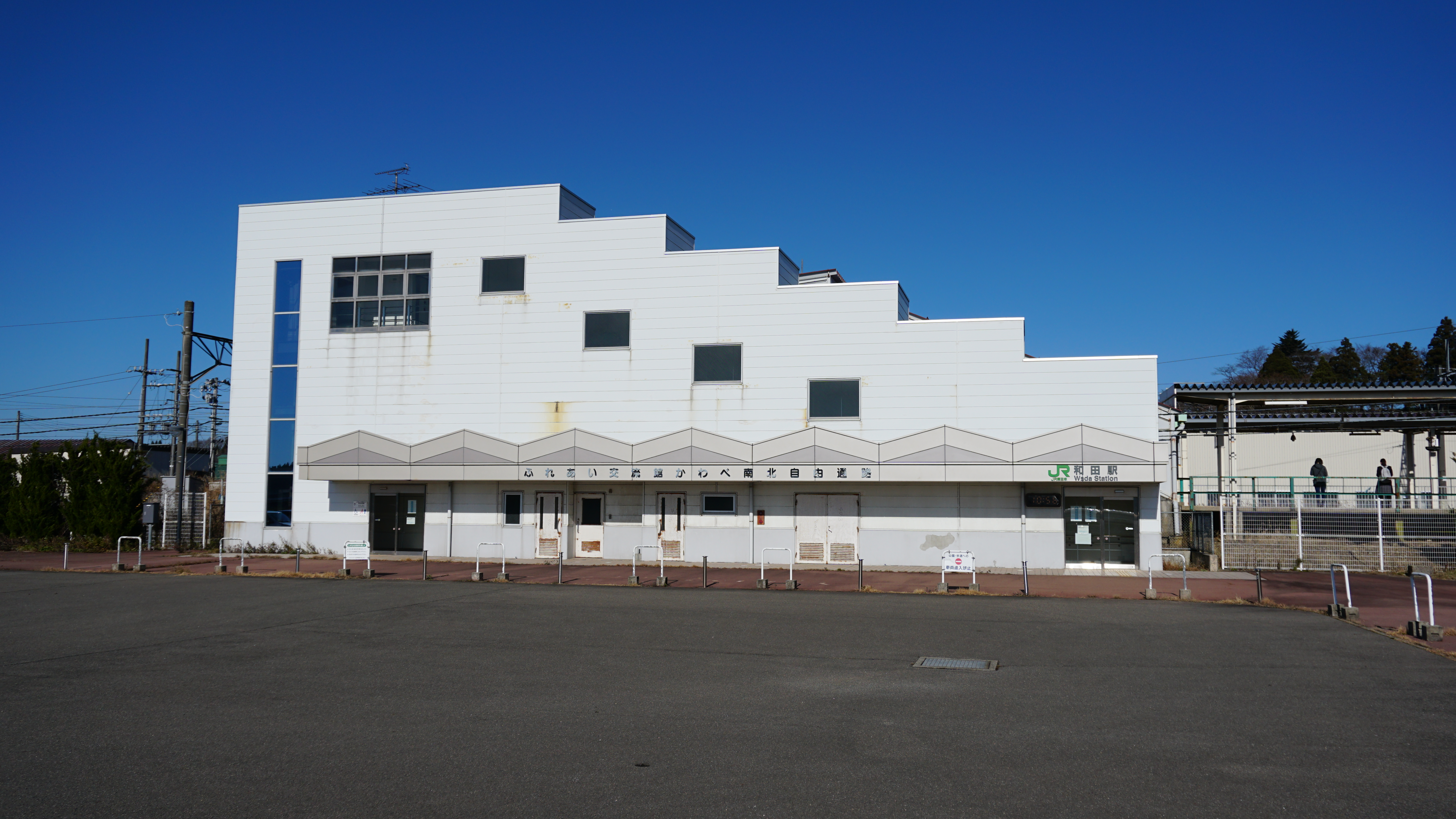 奥羽本線・和田駅（秋田市河辺） Sony ILCE-6300